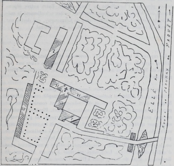 Plan des haras de Langonnet. En hachuré les bâtiments qui étaient occupés par les haras (en I le logement des palefreniers, en II le magasin aux fourrages, en III l'église transformée en manège, en IV les écuries) ; le reste du bâtiment central servait au logement du directeur et du personnel d'encadrement du haras.